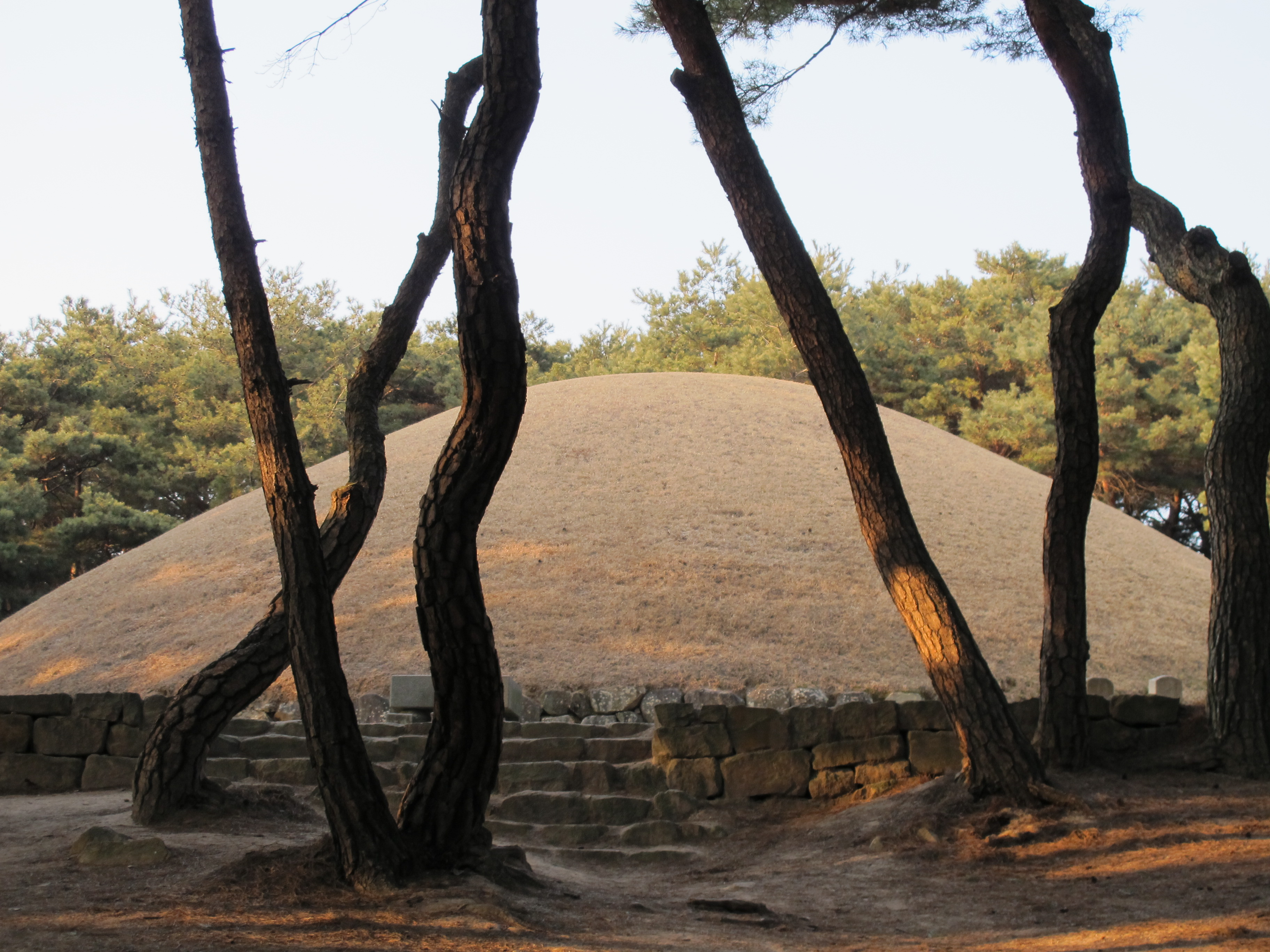 선덕여왕릉